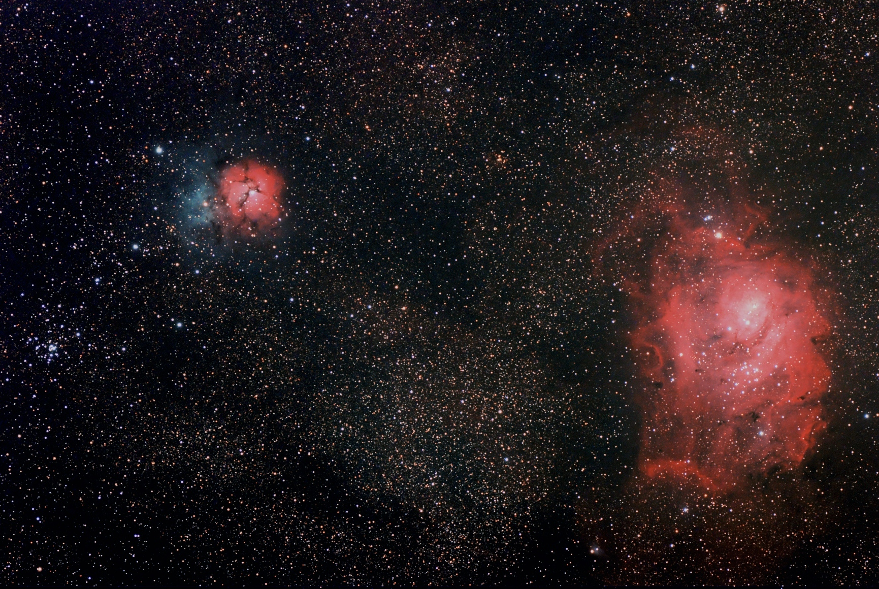 Left: The Trifid Nebula (M 20 odnosno NGC 6514); Right: The Lagoon Nebula (catalogued as M 8, and as NGC 6523)